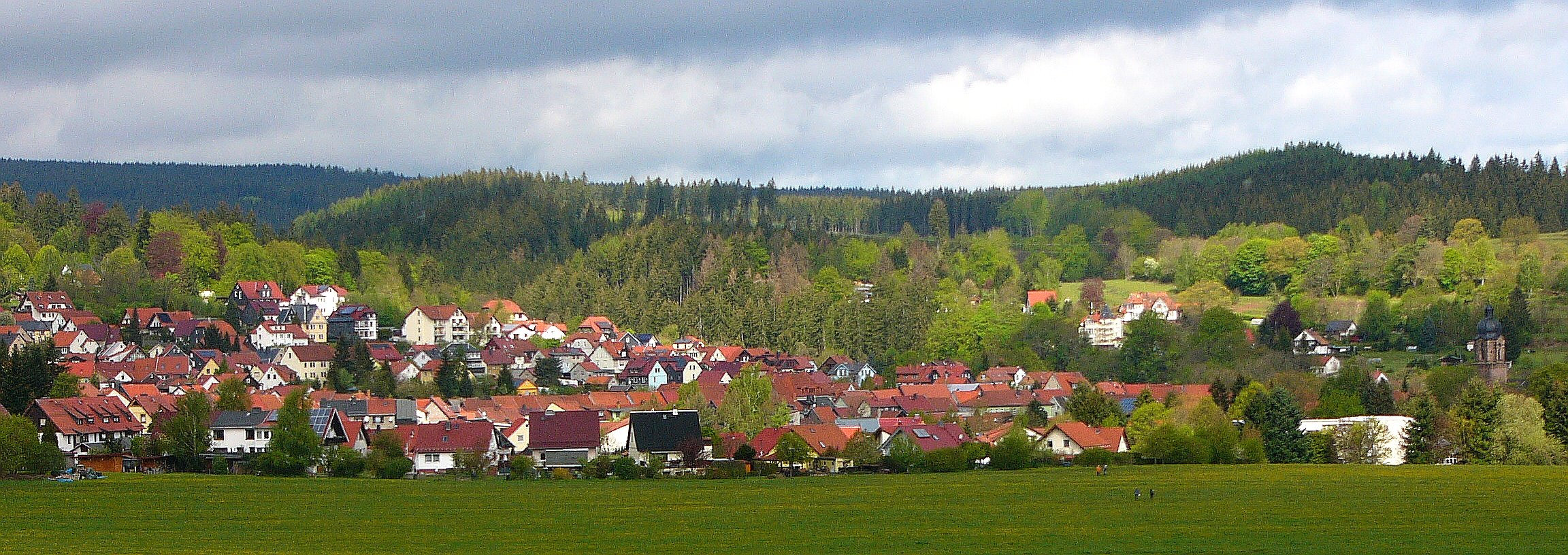 Blick auf Tambach-Dietharz